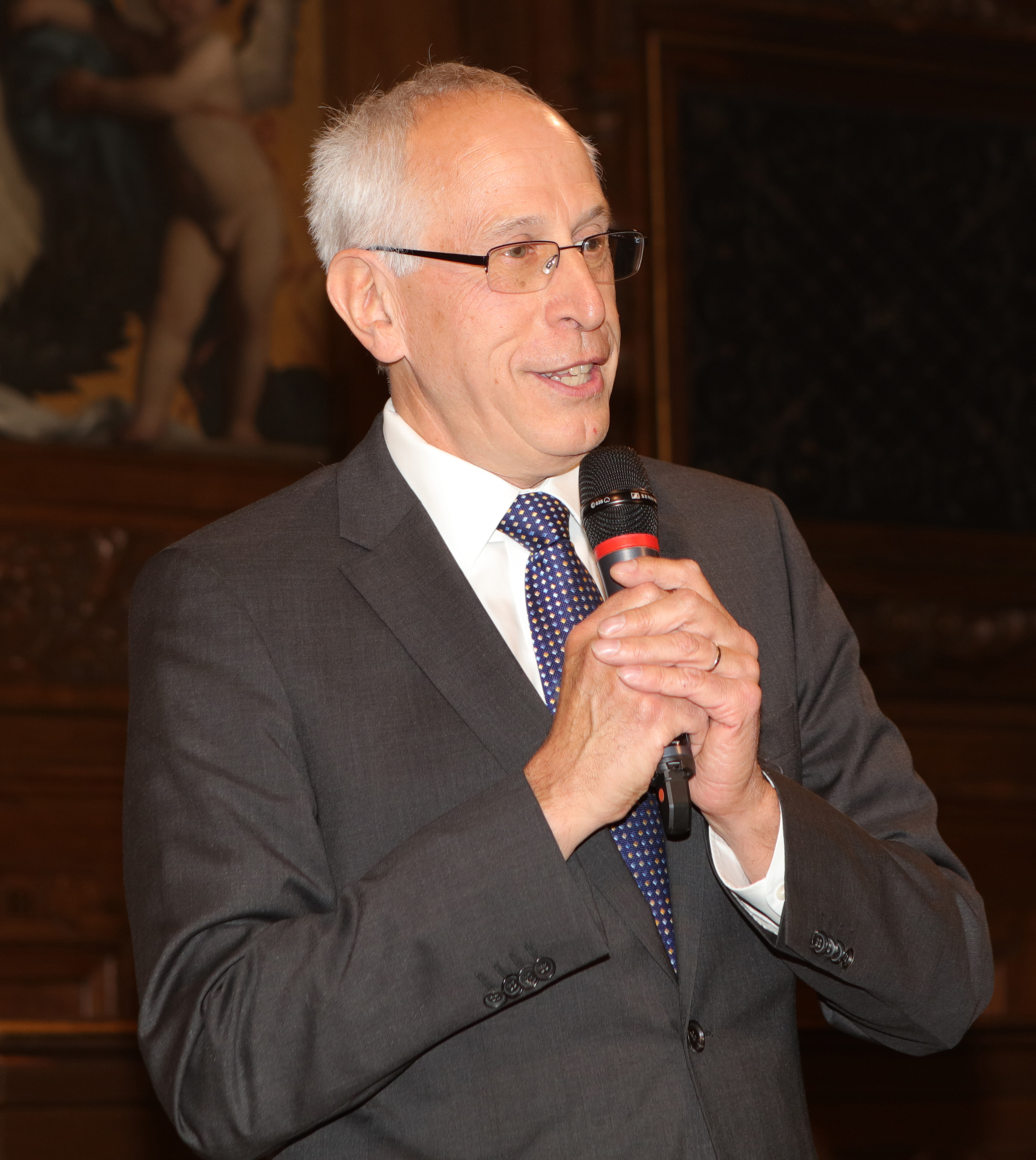 Prof. Dr. Dieter Jahn (Erdingen-Neckarhausen) bekommt die Ehrenmitgliedschaft der GDCh verliehen. Chemiedozententagung am 22. März 2016 in der alten Aula, Ruprecht-Karls-Universität Heidelberg, Grabenstraße 1, 69117 Heidelberg/Deutschland.